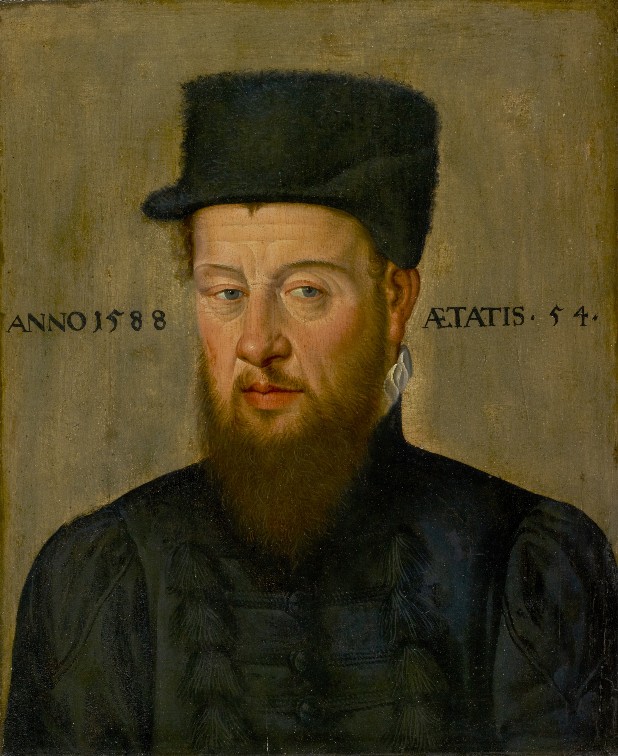 Hans Bock d.Ä.: Bildnis des Theodor Zwinger, 1588. HxB: 37.5 x 31 cm; Öl auf Holz. Kunstmuseum Basel, Inv. 1442